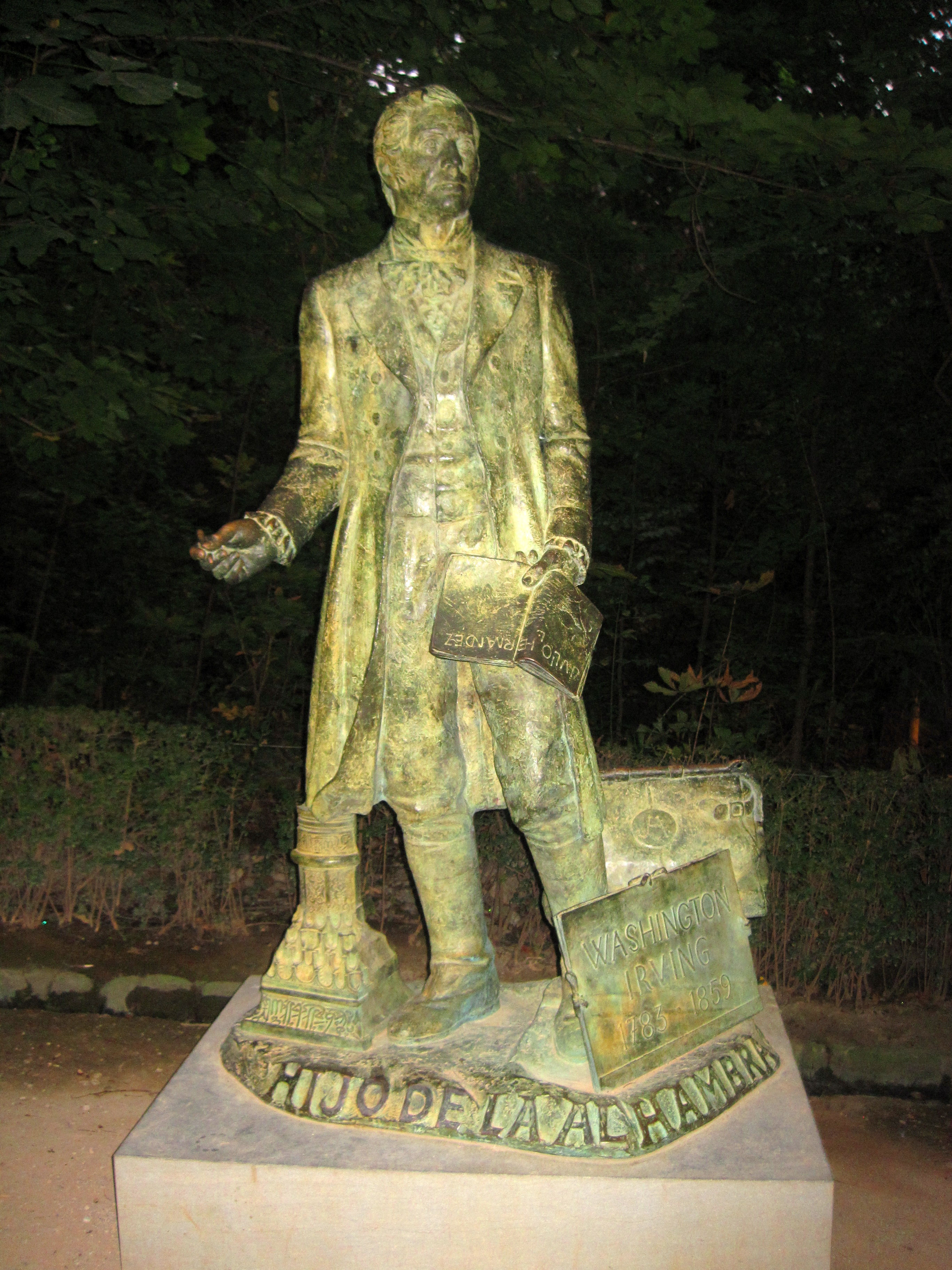 Sección 5.2 Literatura